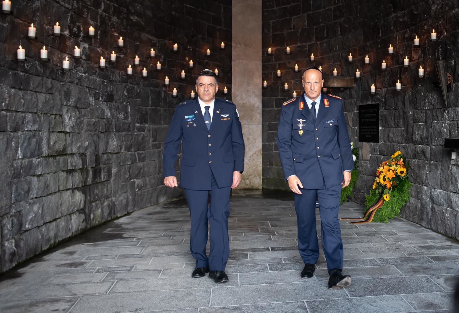 היום (שלישי), התקיים כחלק מתרגיל חיל האוויר בגרמניה, מטס "זיכרון לעתיד" - מטס הצדעה משותף בהובלת מפקד חיל האוויר, אלוף עמיקם נורקין, בליווי מפקדת טייסת הטיסה הראשונה בחיל-האוויר הישראלי, מפקדת טייסת "הנחשון", סגן-אלוף ג', ולצד מפקד חיל האוויר הגרמני, לוטננט גנרל אינגו גרהארץ. בהמשך היום נערך טקס קרקעי במחנה הריכוז "דכאו" בהשתתפות שרת ההגנה הגרמנית, גברת אנגרט קראמפ-קארנבאואר, שגריר ישראל בגרמניה, מר ג'רמי יששכרוף, מפקדי חילות-האוויר ונציגים נוספים.